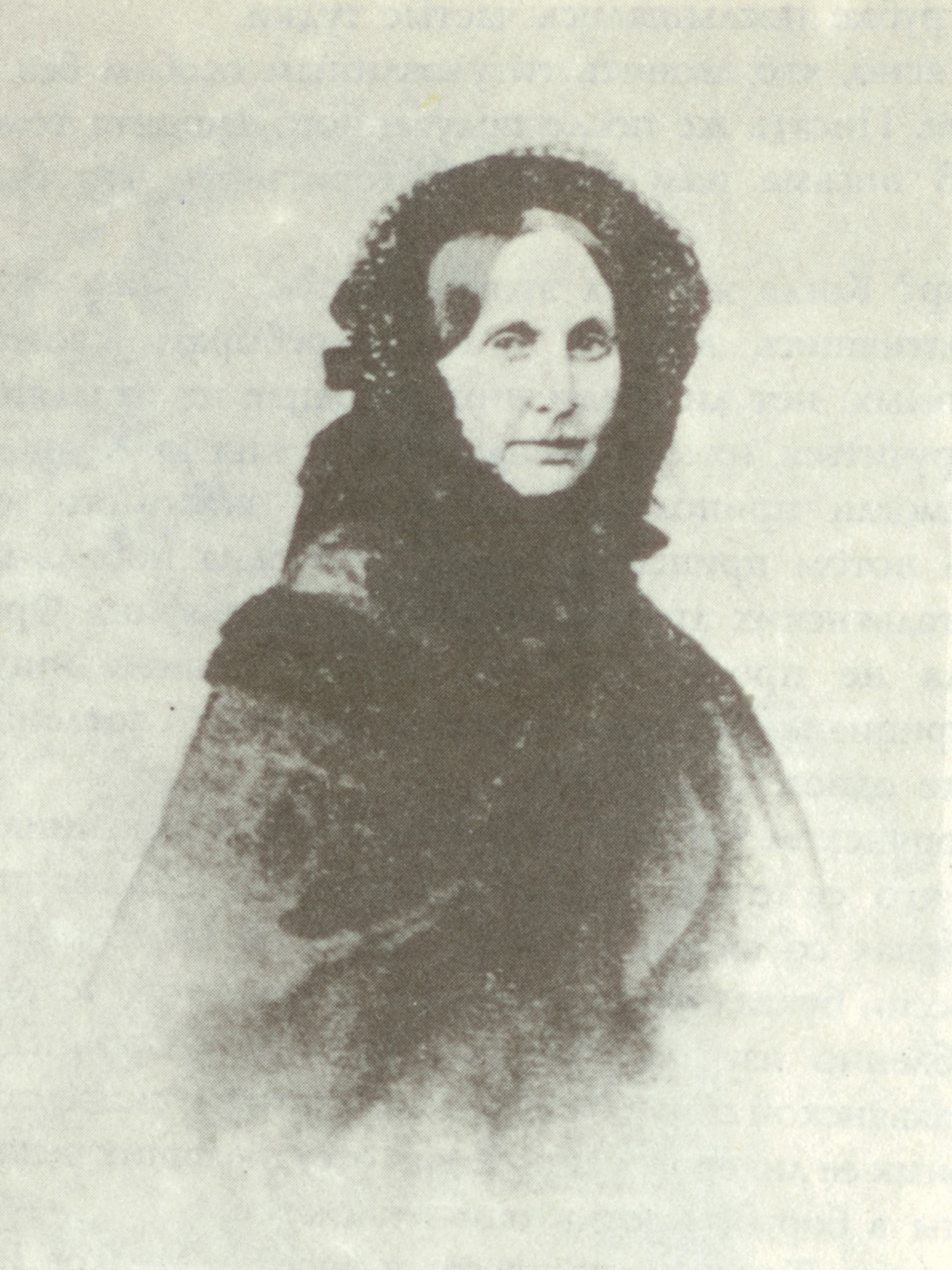 Дарья Федоровна Фикельмон (1804–1863)